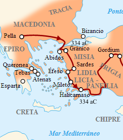 Mapa Zoom sobre la 1º etapa de las conquistas de Alejandro Magno, Asia Menor (Jonia). Alexander The Great battles and campaigns, rutes